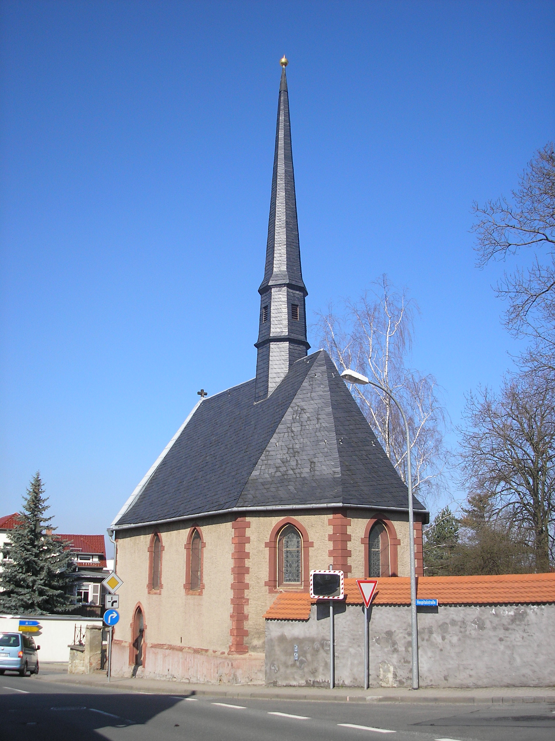 Die Friedhofskirche in Schmölln (Thüringen).